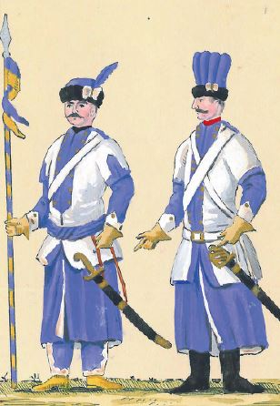 56. Ułan i pocztowy 2 Pułku Ułanów Litewskich (ułan i pocztowy 2 PPS buławy WL